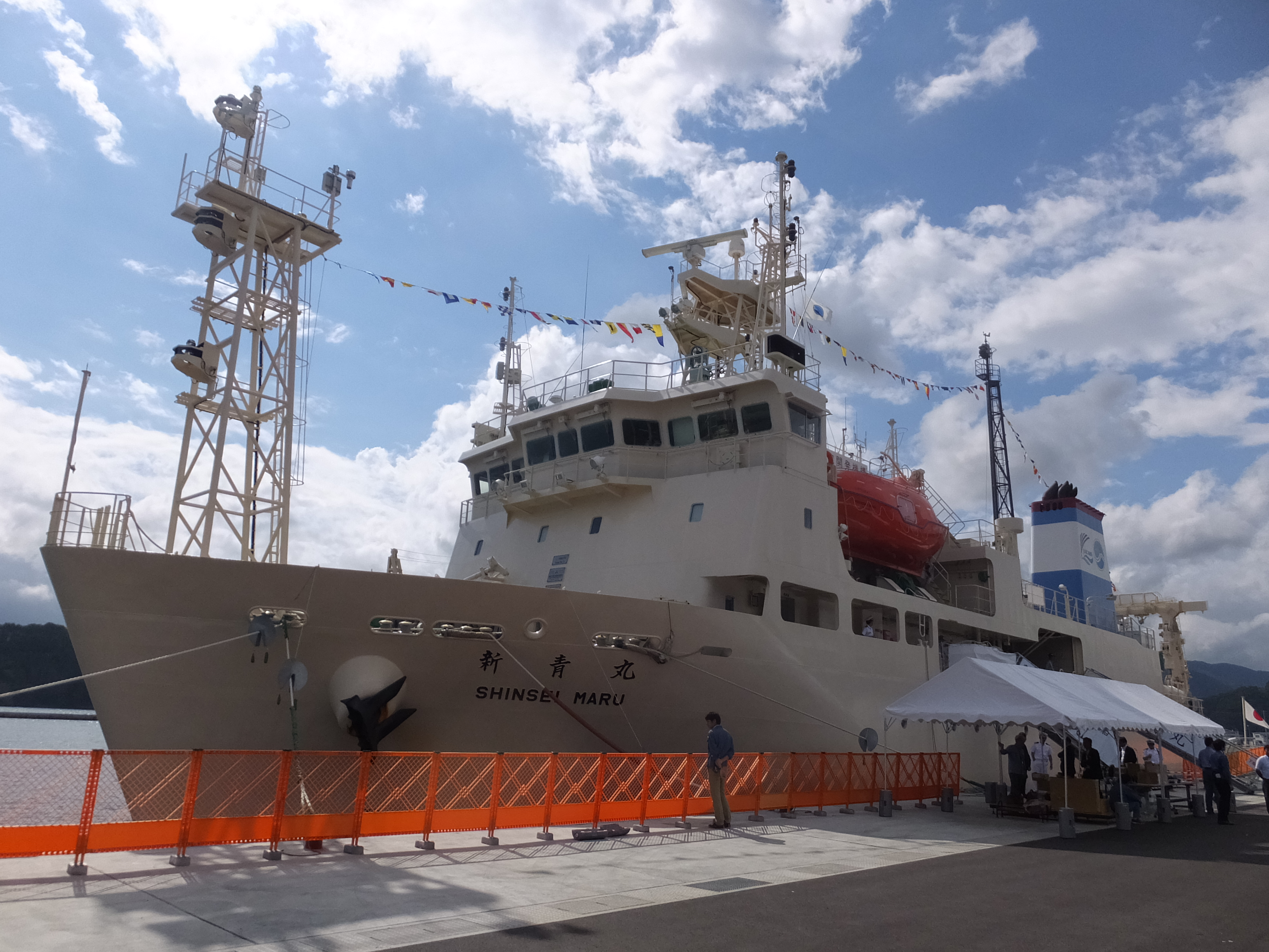 海洋研究開発機構(JAMSTEC)の海洋調査船「新青丸」